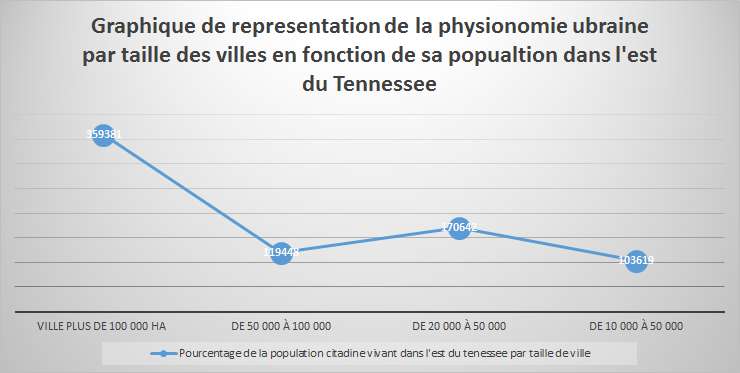 Il s'agit de mettre envidence en fonction des donné fournie par l'article si le reseaux est equilibre au nom , loi stitpulant pour qu'il soit equilibre , la 1 ville doit valoir double de seconde , et de quadruple de la troisieme.